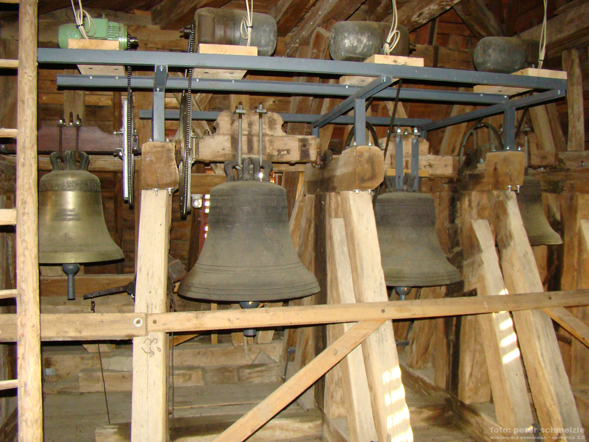 Glockenstuhl in St. Salvator, Neckarbischofsheim